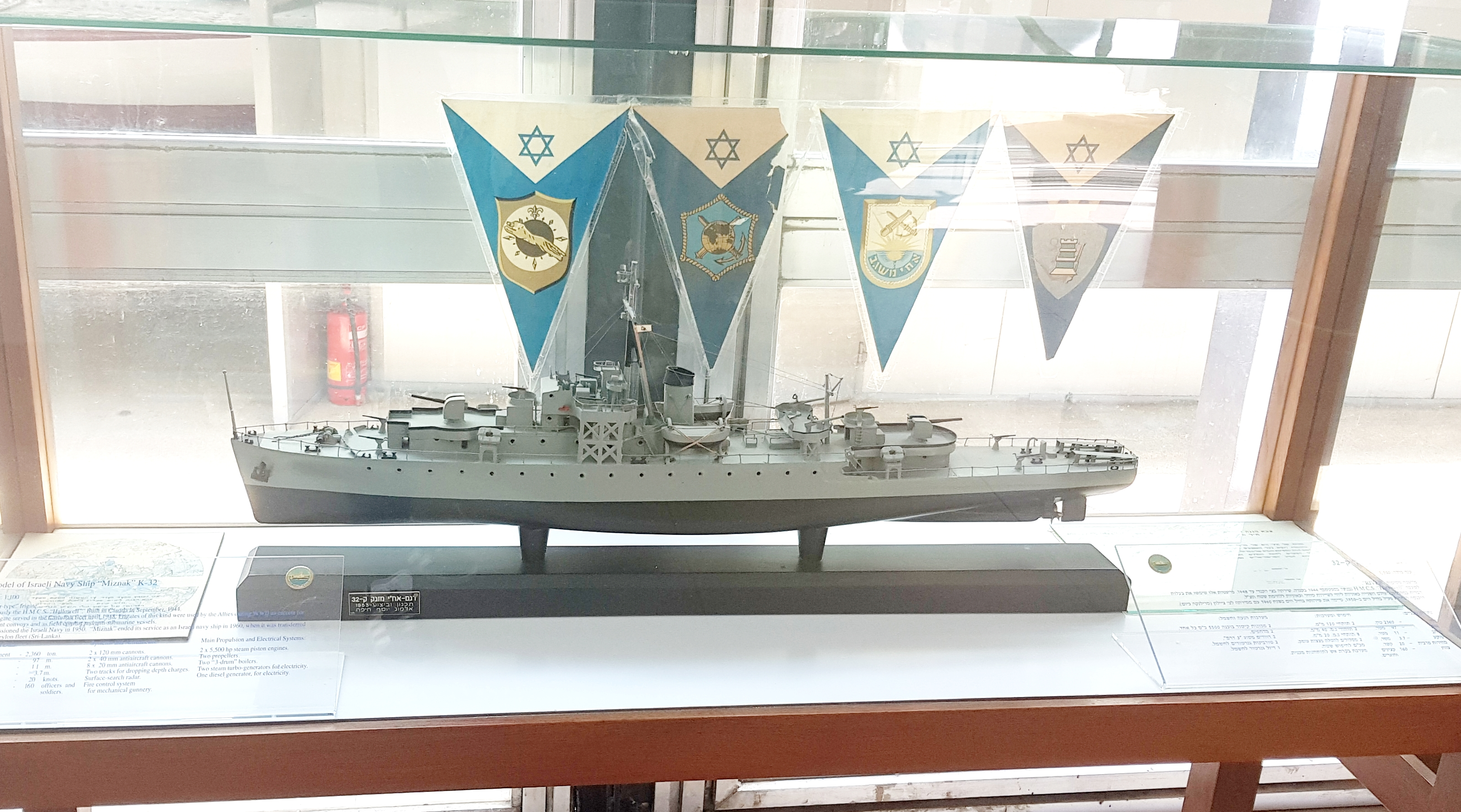 דגם הפריגטה אח"י מזנק (ק-32) במוזיאון ההעפלה וחיל הים